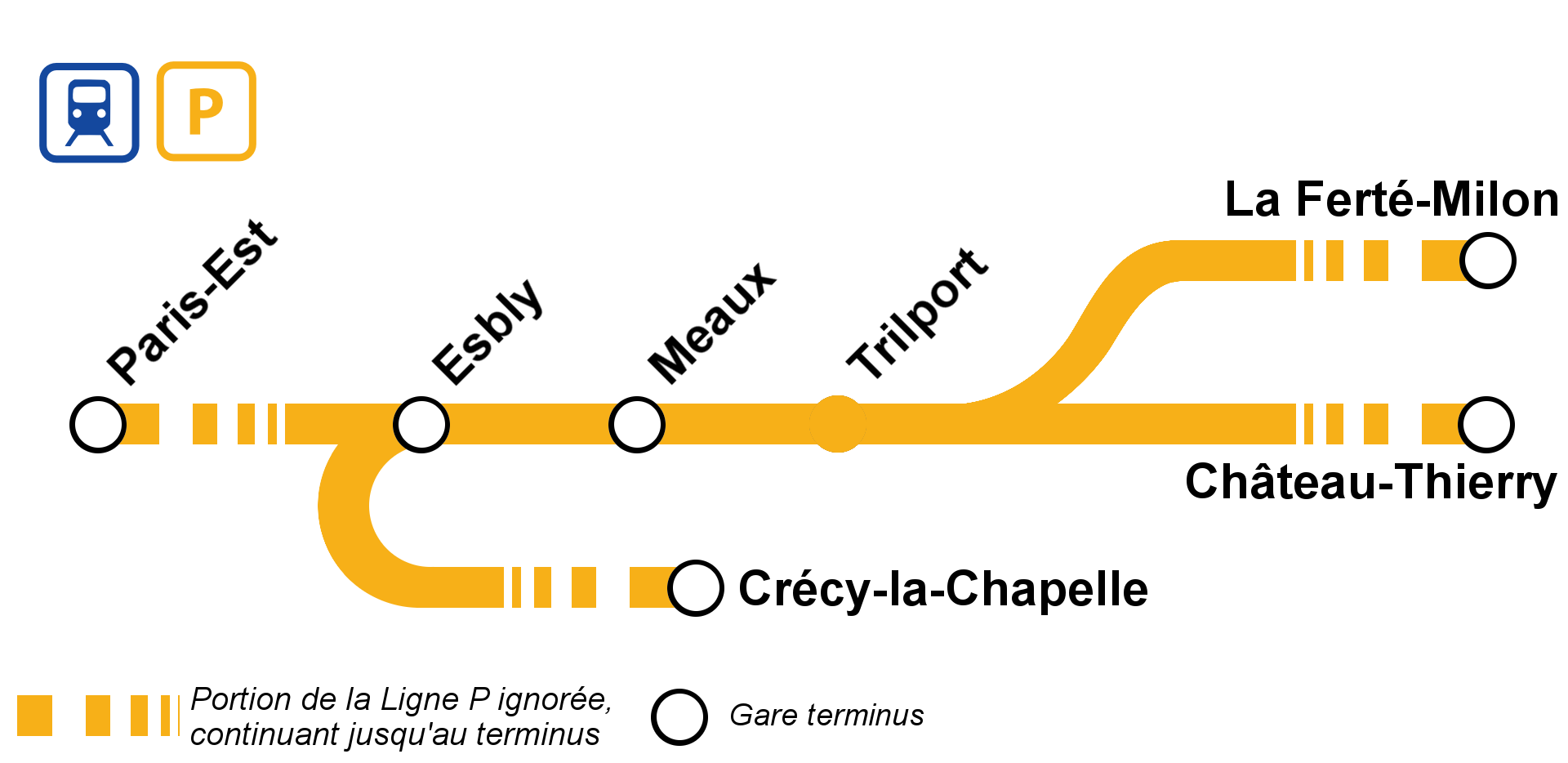 Schéma simplifié de la parte nord de la ligne P autour de la gare de Meaux.